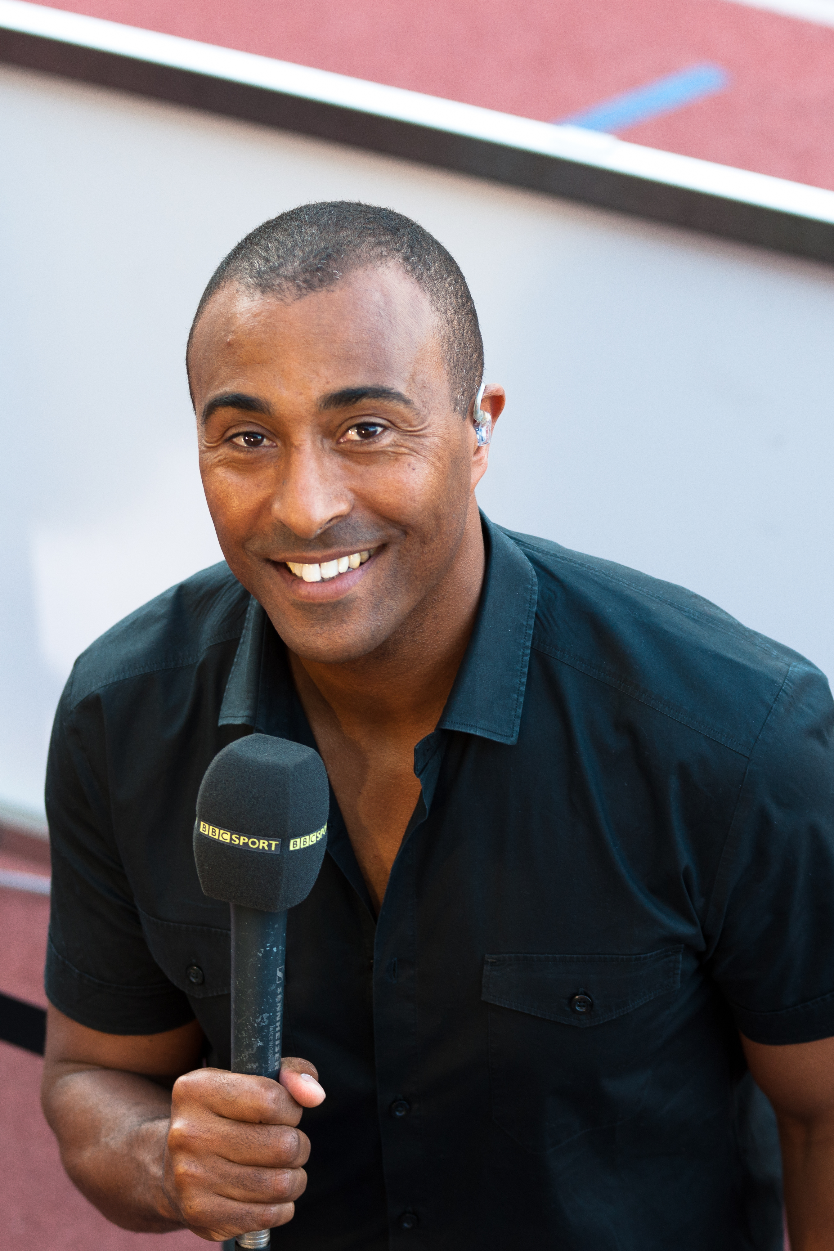 Athletissima 2012 - Colin Jackson